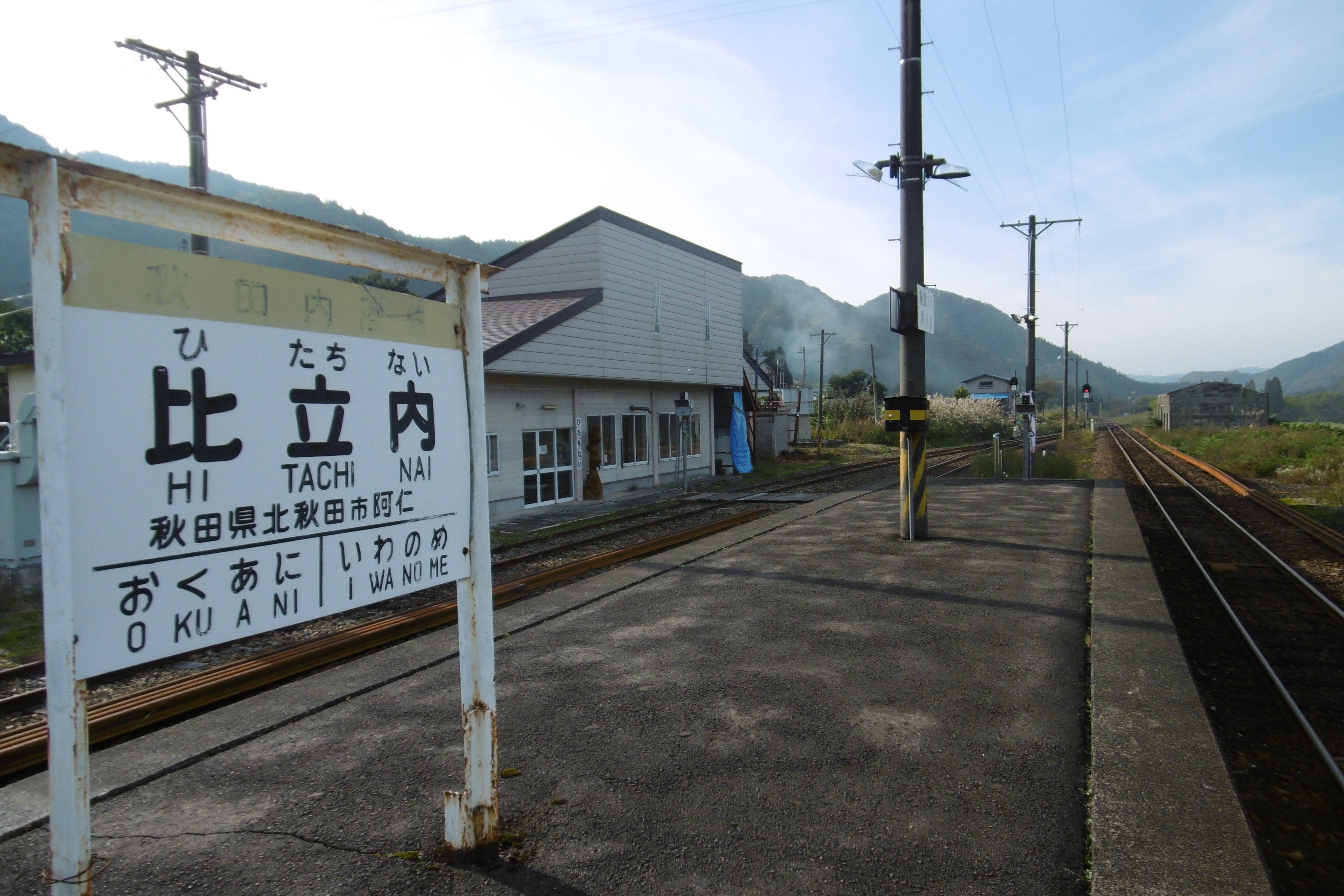 秋田内陸線 比立内駅 ホーム